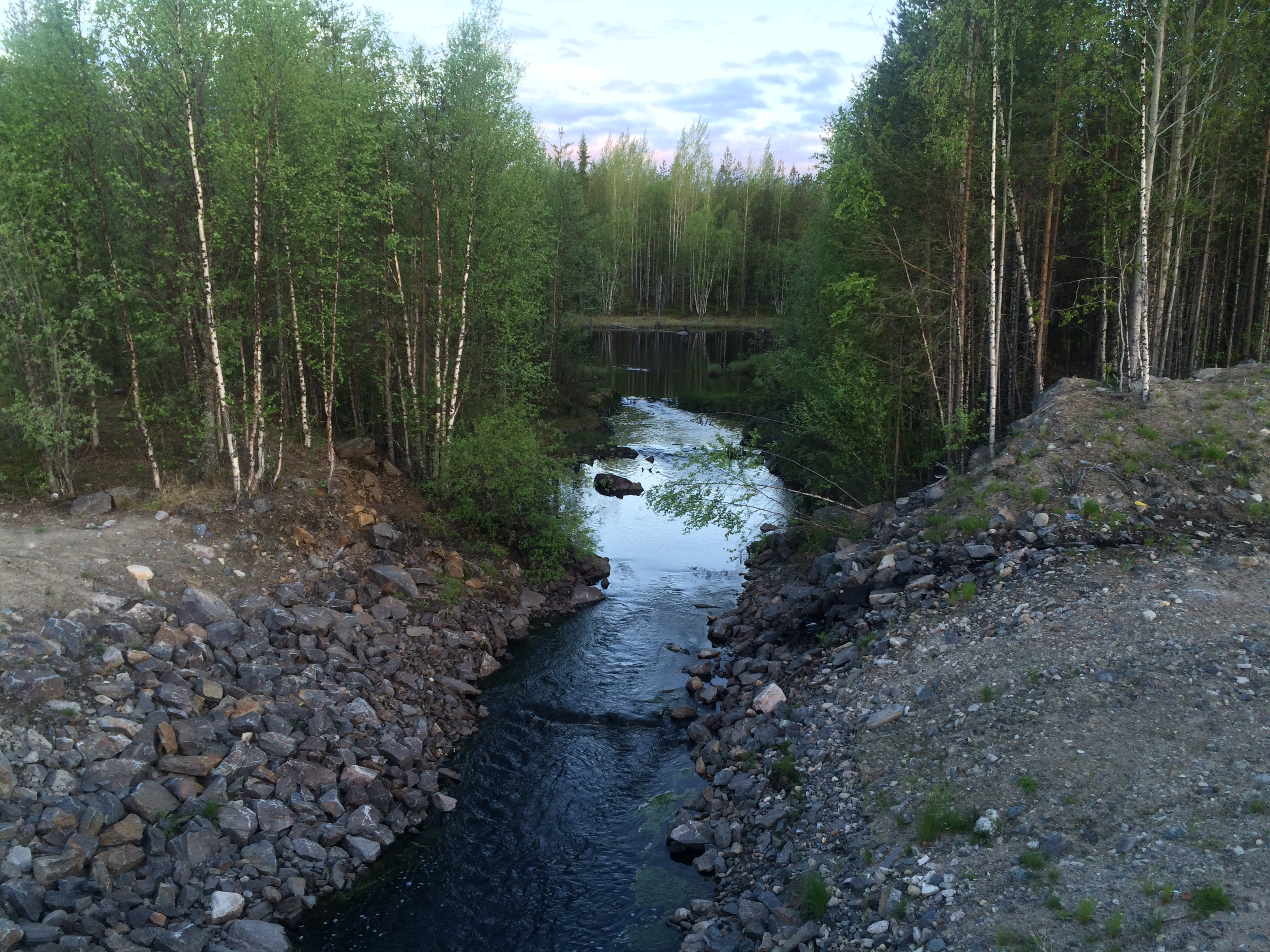 Викшречка (Егут)